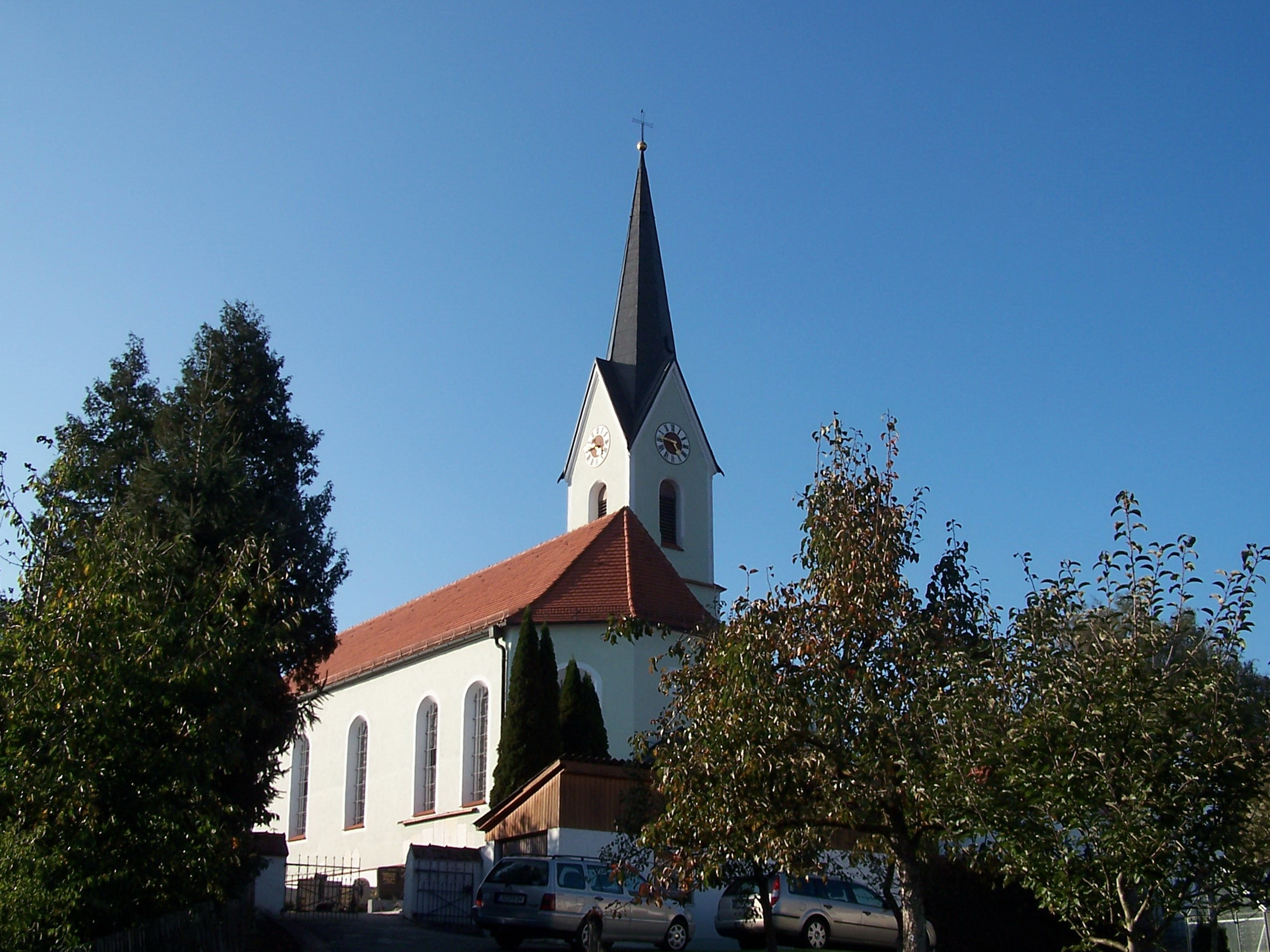 Niederhornbach, Kirchstraße 7. Kirche St. Laurentius. Barockbau von 1694; mit Ausstattung.